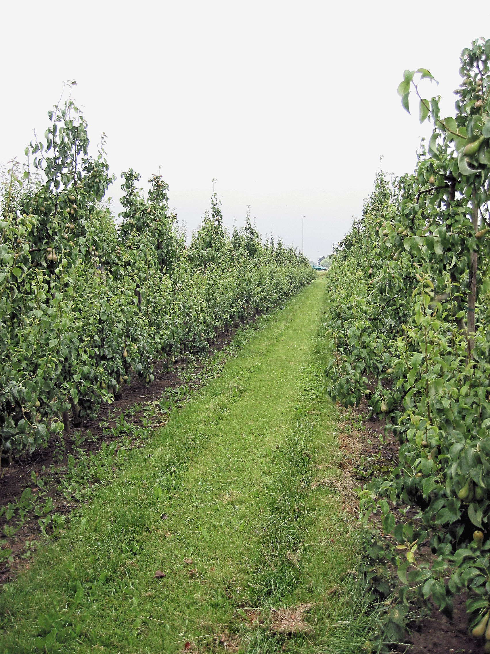 Perenboomgaard van Conference